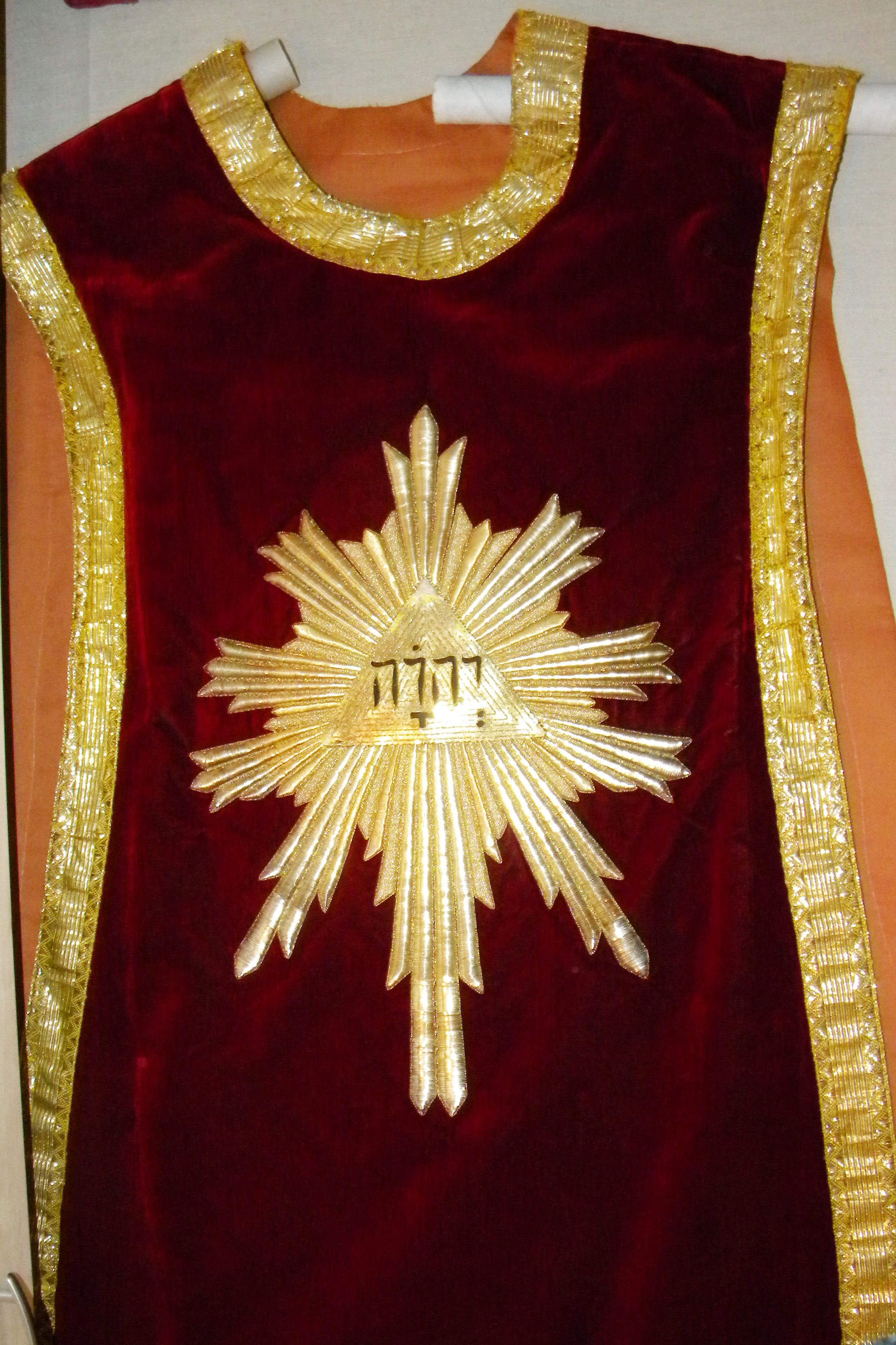 Mässhake med tetragrammet JHWH i Solberga kyrka